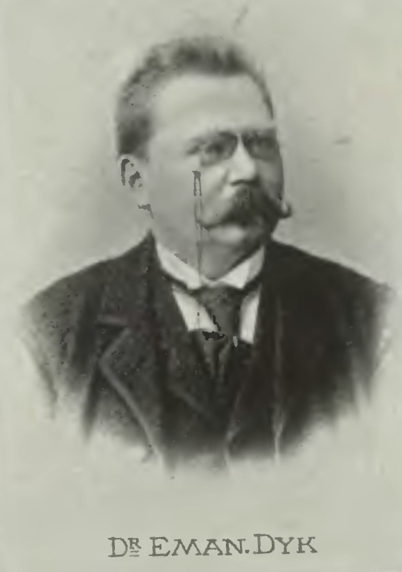 Portrét – Emanuel Dyk (1852-1907), Český politik.